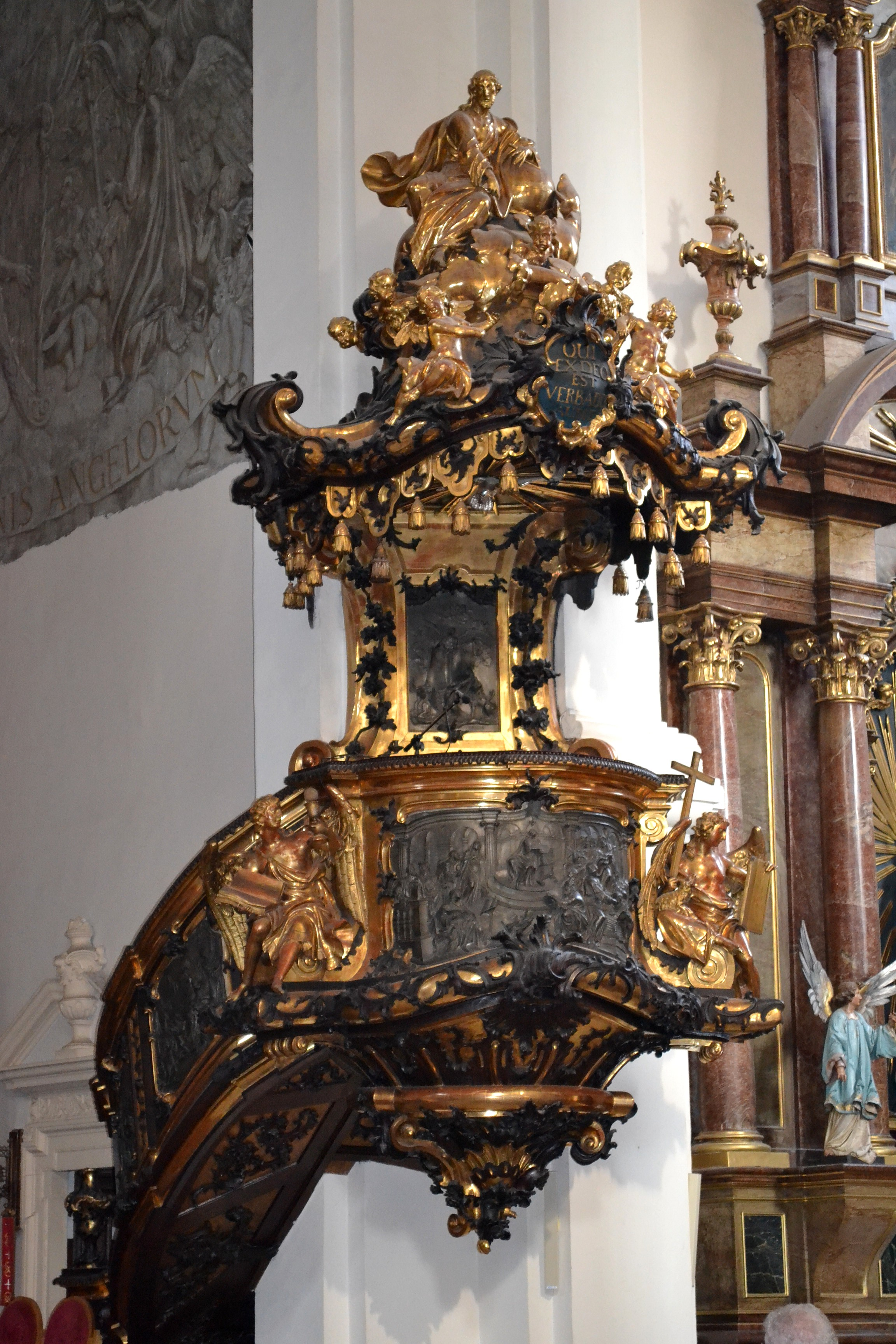 Rokoková kazateľnica z r. 1753- celkový pohľad